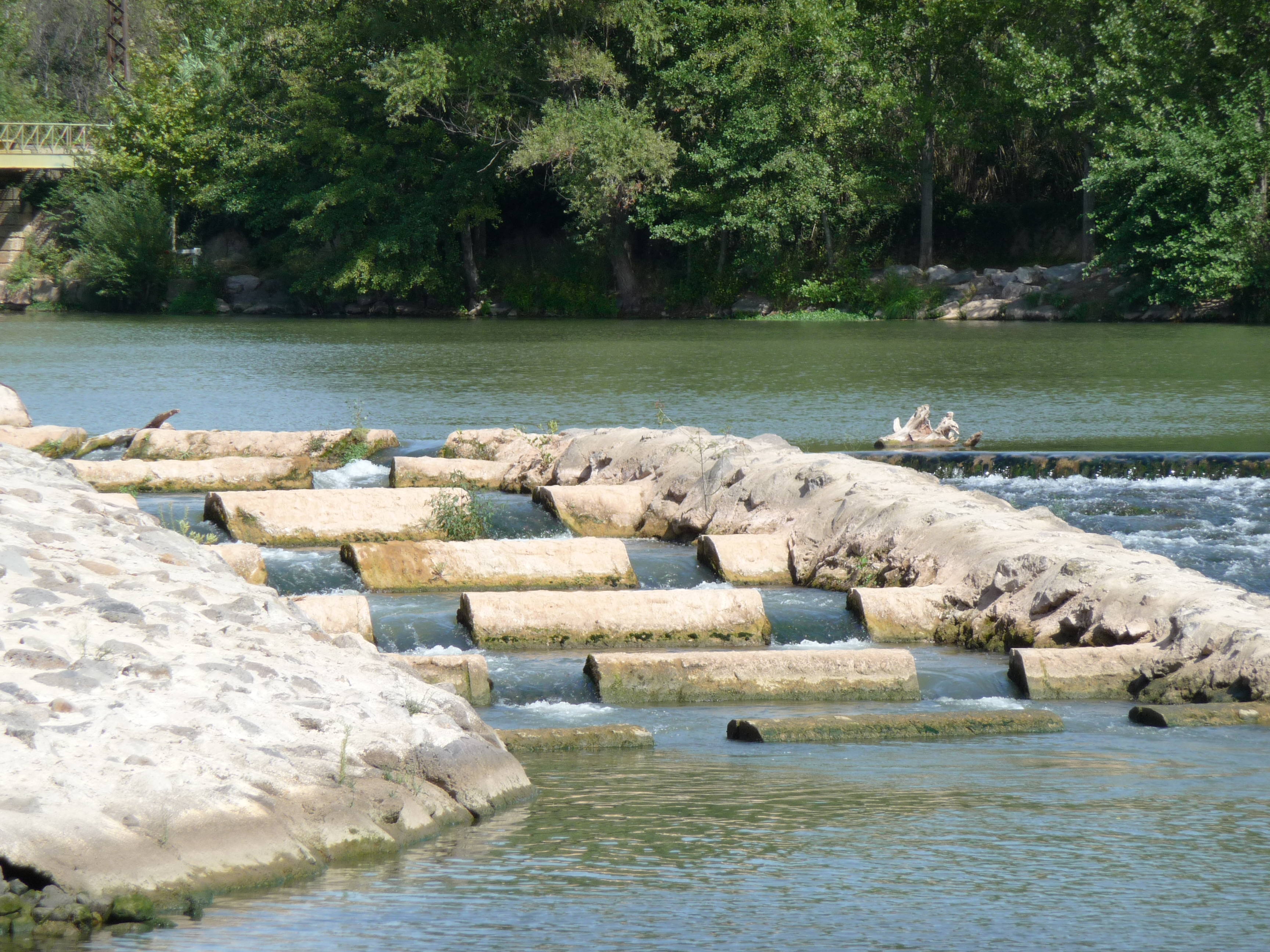 Passe à poisson sur le barrage de la Pansière à Agde (Hérault, France)